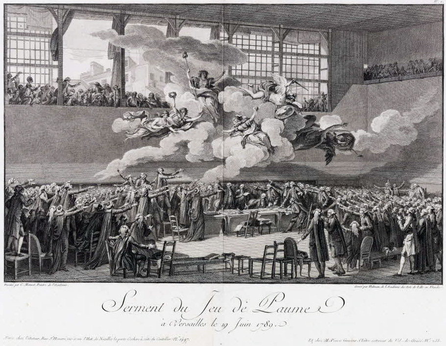 Gravure à l'eau-forte par Helman d'après C. Monnet, « Serment du Jeu de Paume à Versailles » le 19 juin 1789